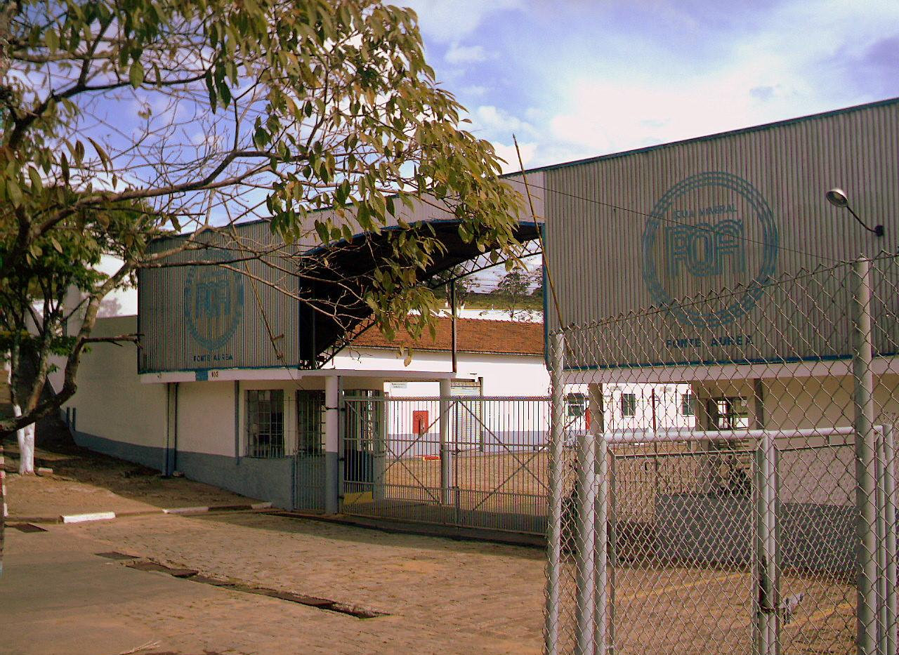 Fachada da empresa Água Mineral Poá